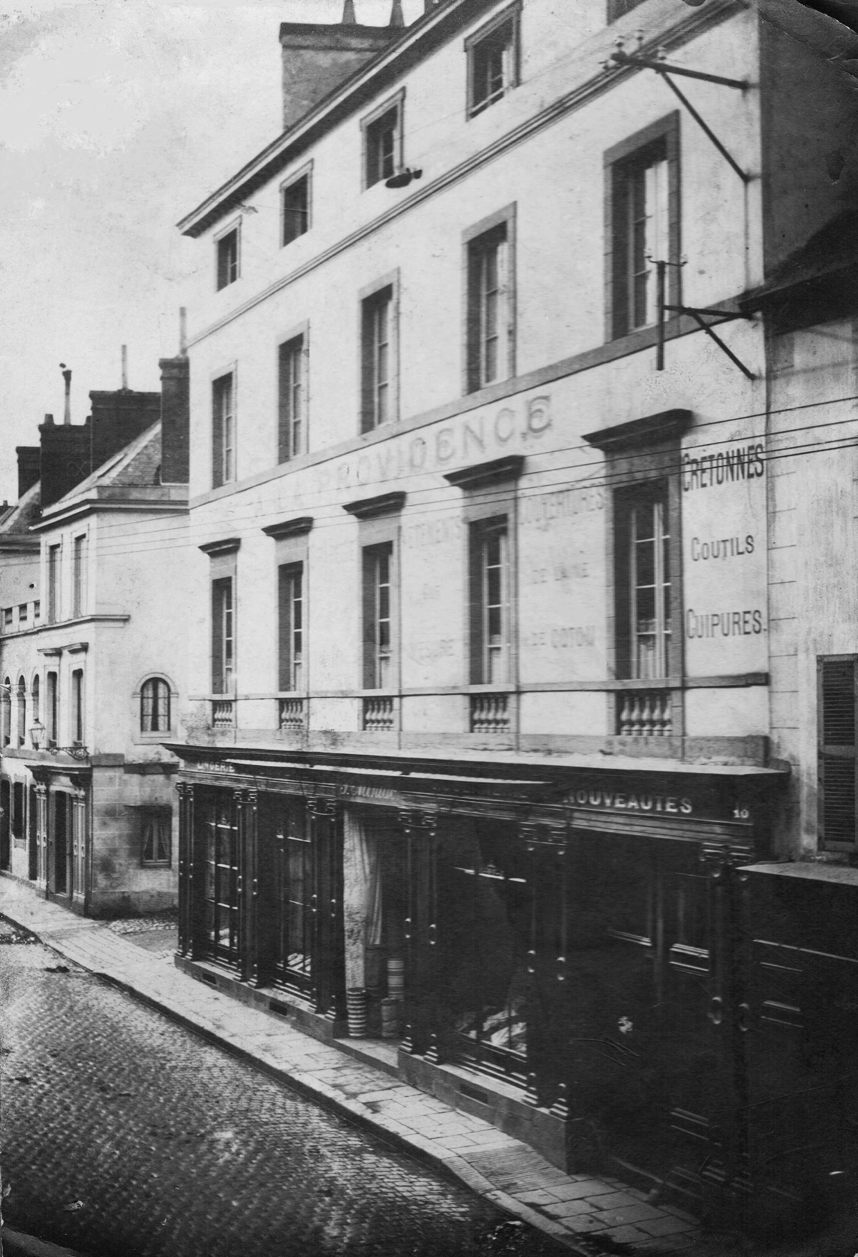 La maison Miniac, au 18 rue Ville-Pépin à Saint-Servan-sur-Mer (Saint-Malo). Maison d'habitation et de commerce ("A La Providence", commerce de tissus de Paul Miniac (1841-1936), de Louis Miniac (1887-1952) et de Marie Miniac née Sarciaux(1897-1982), de 1900 à 1954. Puis, tissus Dubois-Barbotin (1954-1980), agence immobilière Jean-Jacques Quiniou et compagnie (1980-1986), agence immobilière Serge Dejan (1986-1996), Banque Populaire de l'Ouest (1996-2007), opticien Stéphane Petit (Atol Les Opticiens (2007), puis Grand Optical (2008-...).